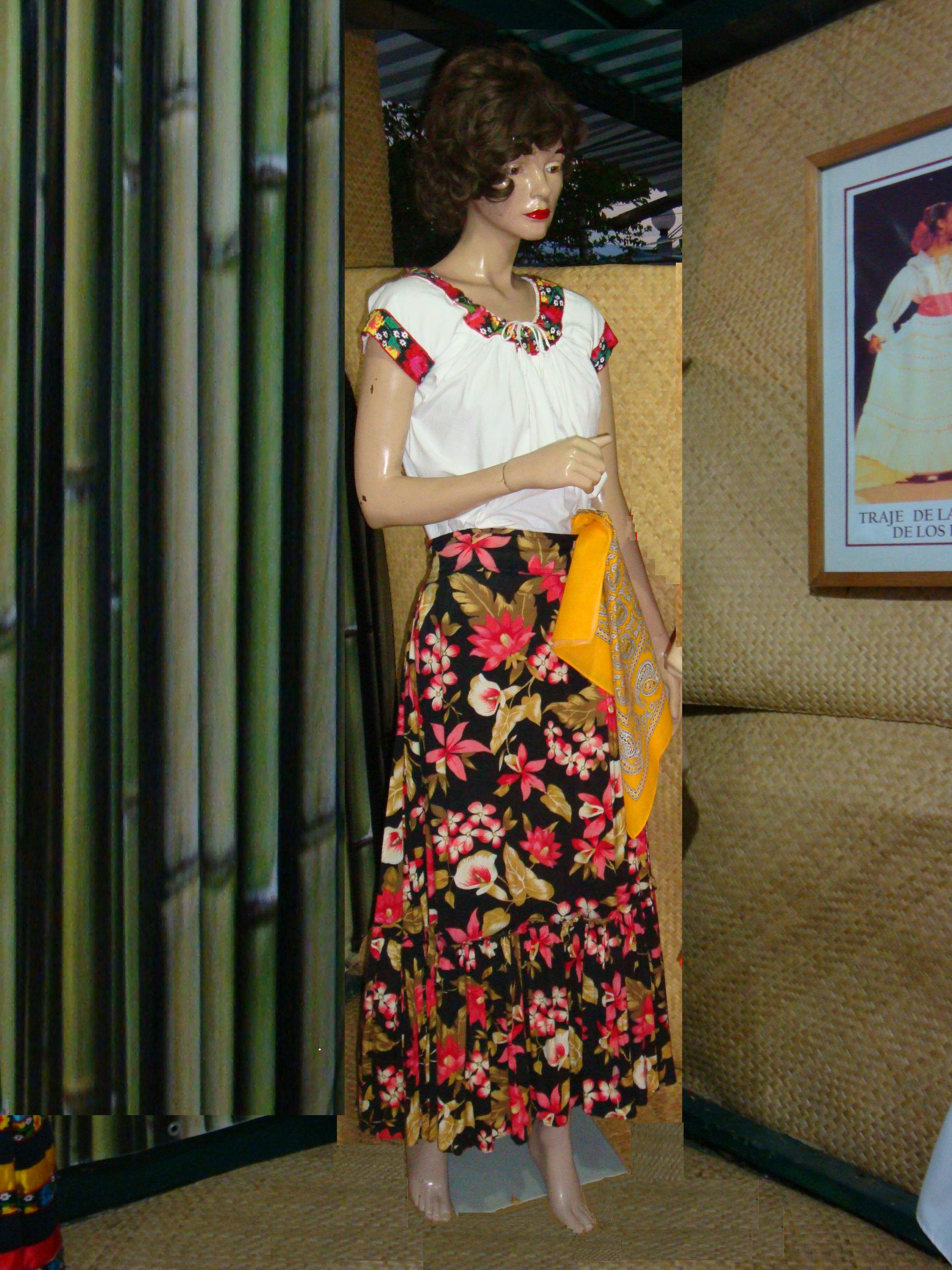 Traje regional "ordinario" del estado de Tabasco, México.